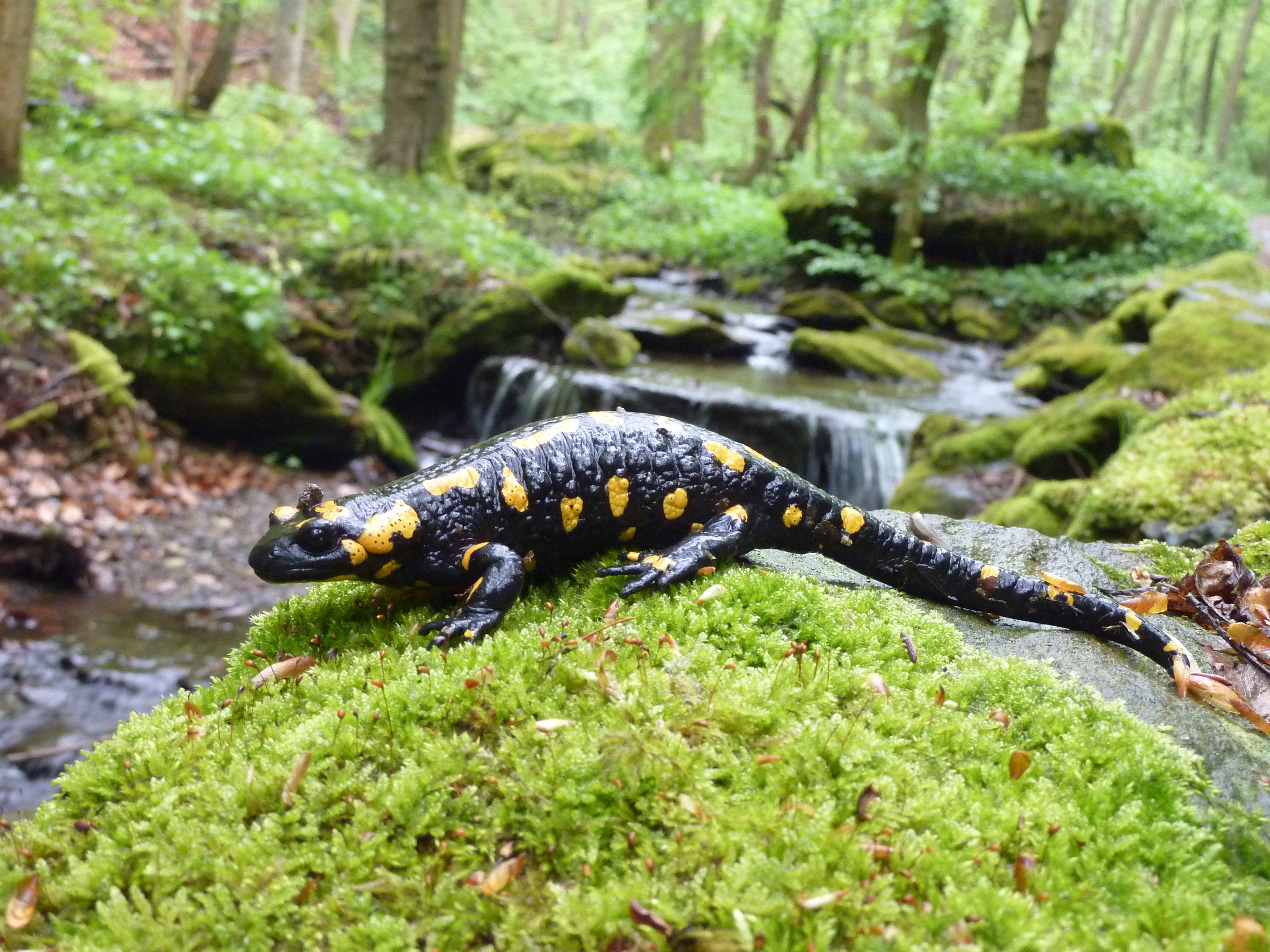 Thayatal This file shows the National Park Thayatal in Austria.